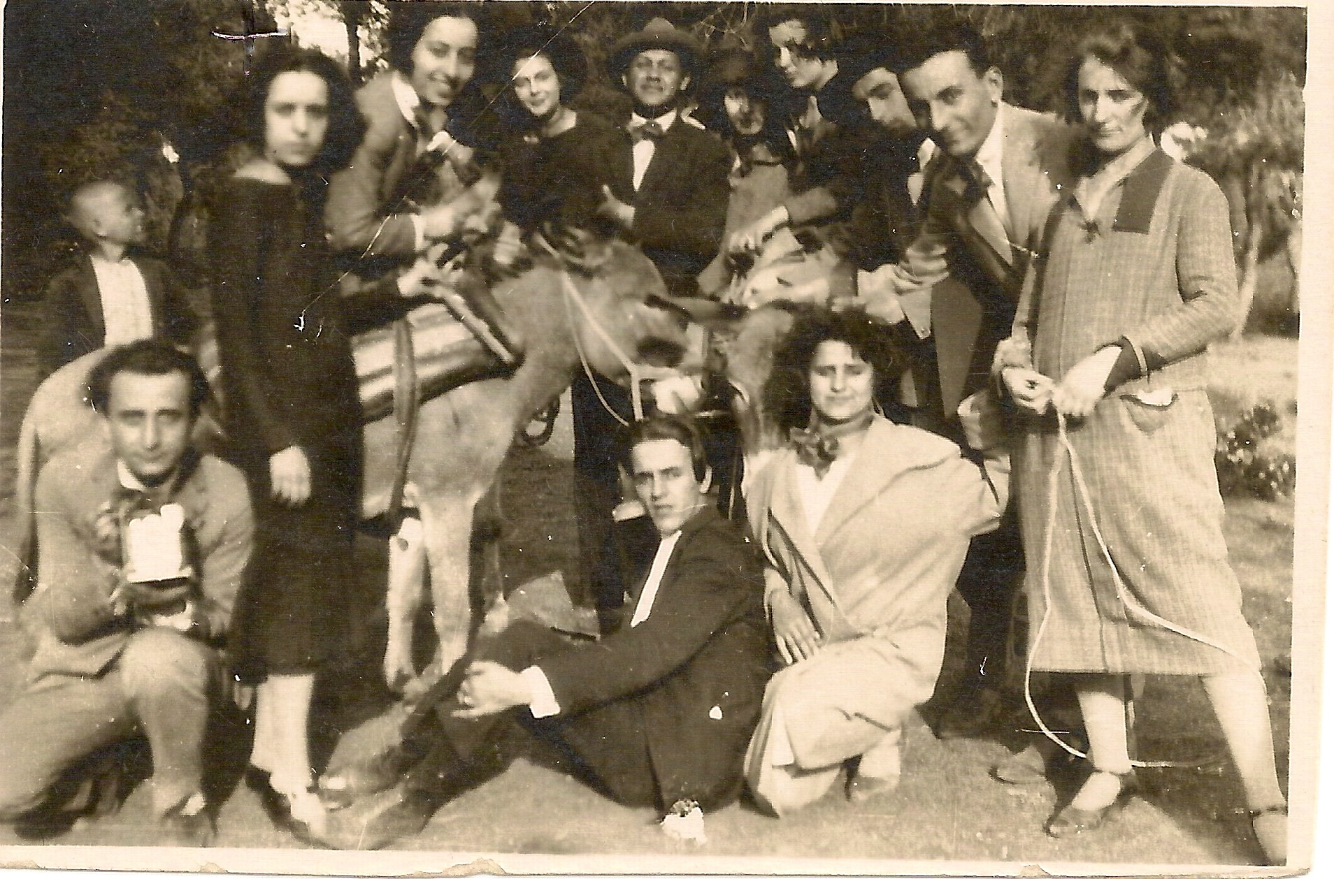 Maria Poliduri amb el grup de l'Escola del Teatre Nacional de Grècia el 1925.